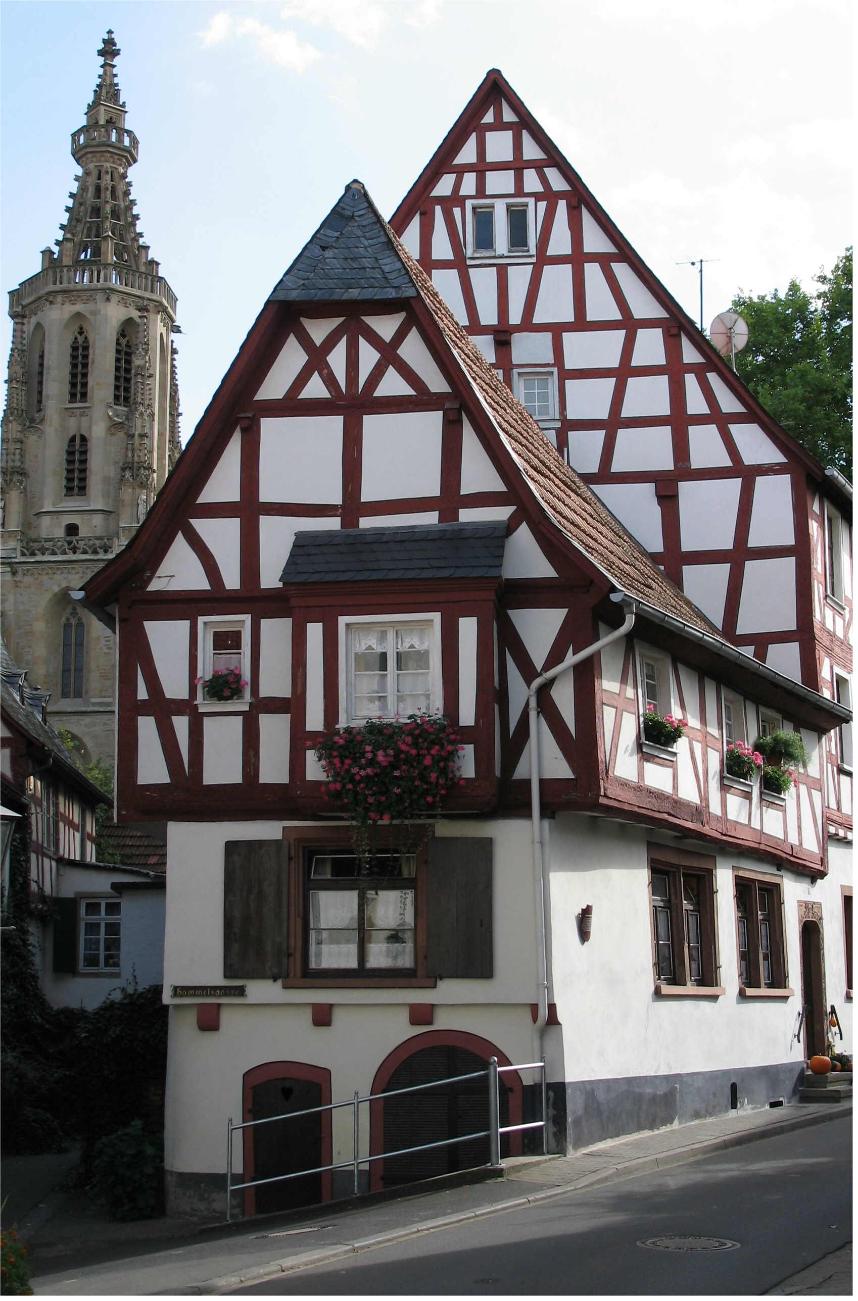 Obergasse 4, "Ritterherberge" Fachwerk 16. Jahrhundert Tür und Fenstergewände 1725. Beherbergte die Gebrüder Stumm 1768 während des Einbaus der Orgel in der Schloßkirche